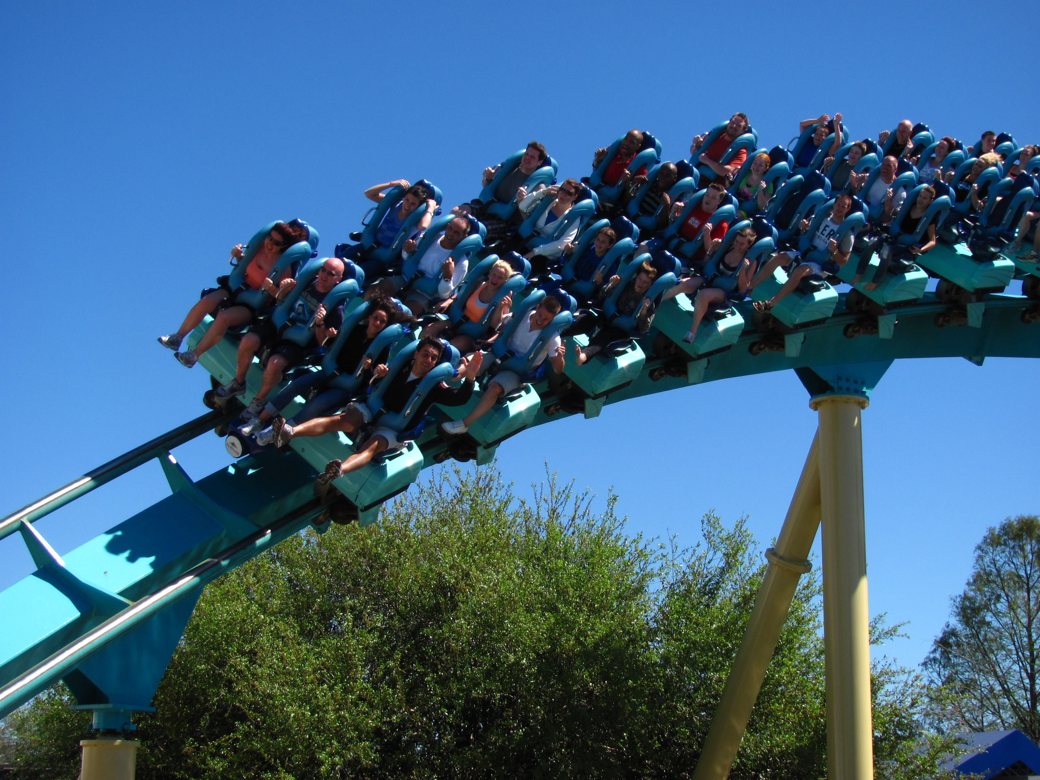 Kraken